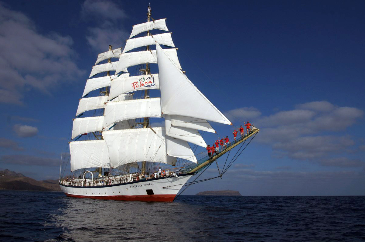 STS Chopin, 2011, Madera, Szkoła pod Żaglami, pod pełnymi żaglami z boku.